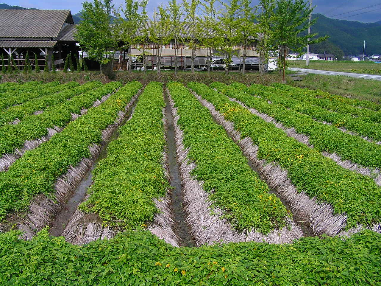 山芋畑 篠山市